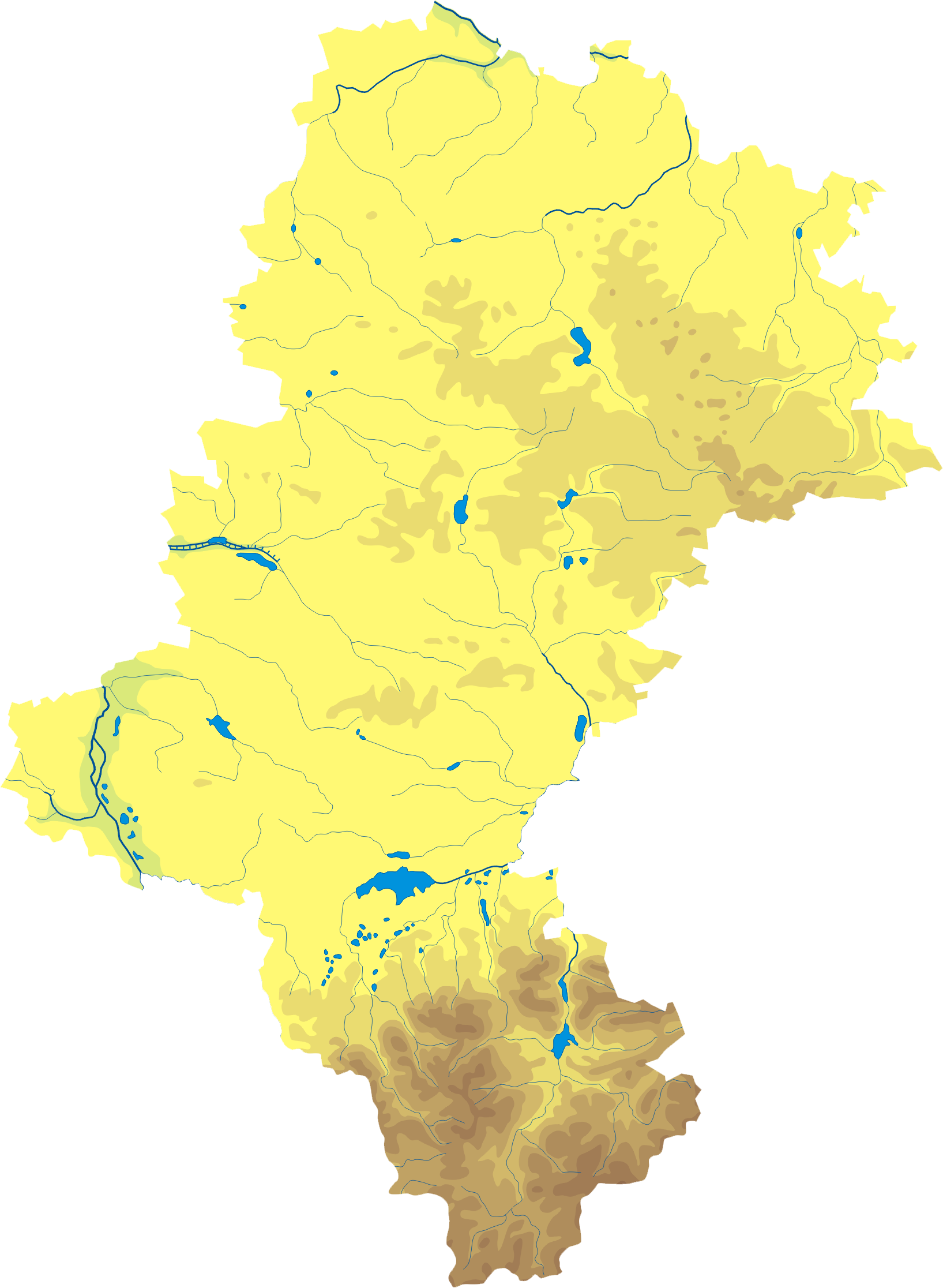 Mapa wód i ukształtowania powierzchni województwa śląskiego. Autor: AotearoaWspółrzędne graniczne mapy: N: 51.0994° N S: 49.3939° N W: 18.0350° E E: 19.9739° E Legenda